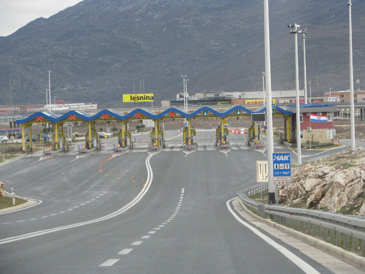 Naplatne kućice u Dugopolju kod Splita na autocesti A1